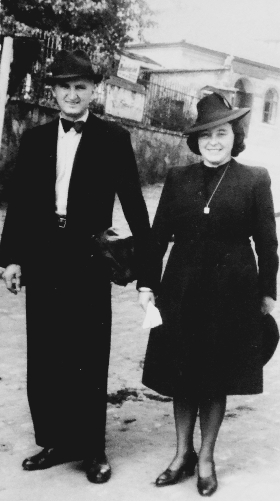 František Kubr, český divadelník a organizátor dělnického ochotnického divadla ve 20. a 30. letech 20.století, se svojí budoucí manželkou Marií (v době působení v Lidovém divadle, kolem roku 1940)